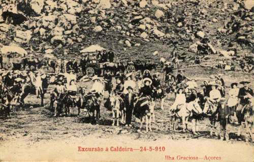 24.05.1910, Excursão à Caldeira, ilha Graciosa, Açores, Arquivo de Villa Maria, Angra do Heroísmo, Açores.